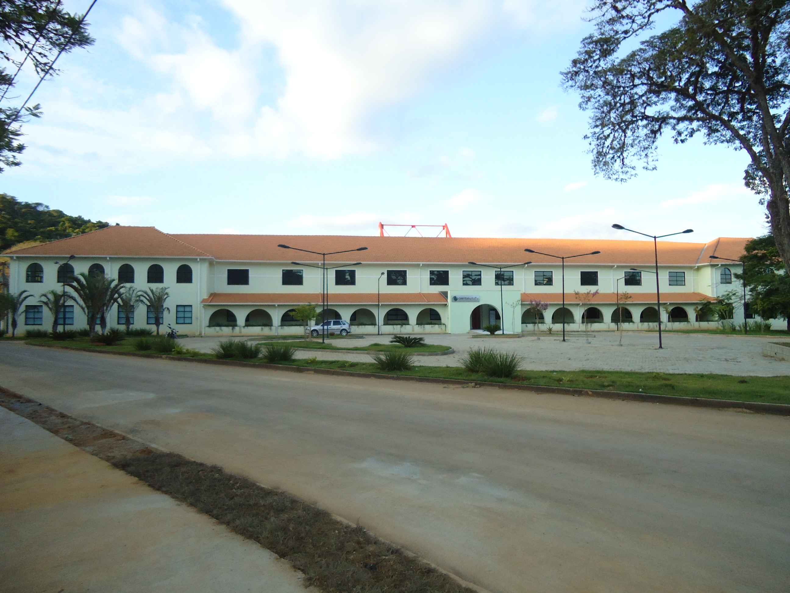 Prédio construído nos anos 1920 para ser patronato agrícola, reformado no anos 2000 para sediar o parque Tecnológico de Viçosa